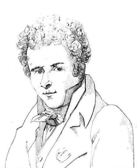 Millin